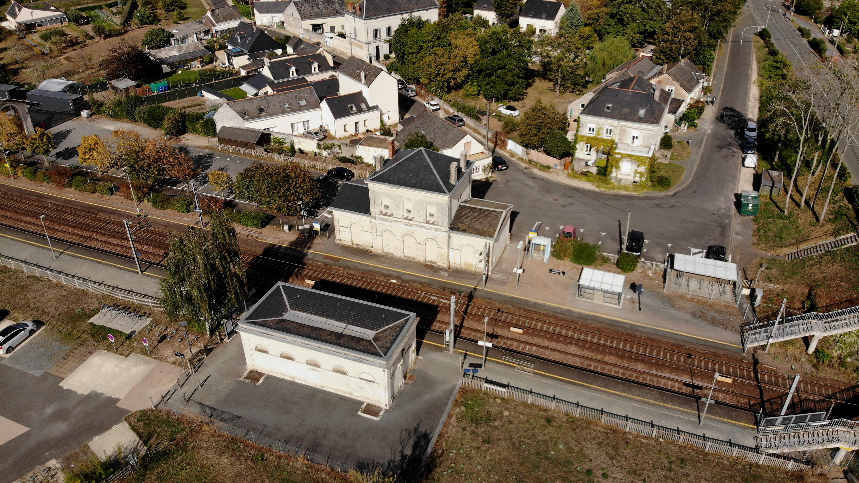 Vue aérienne de l'ensemble de la gare de Saint-Mathurin.